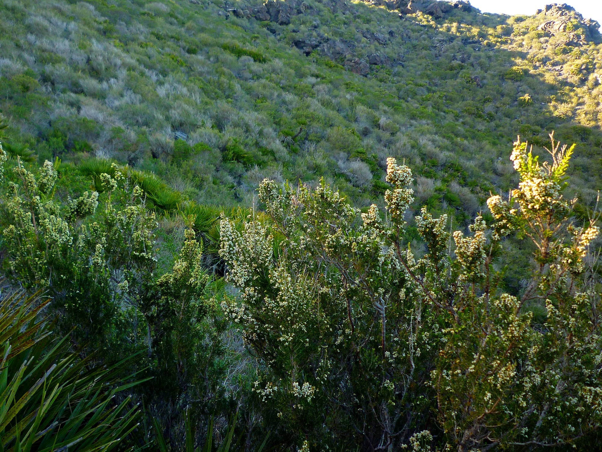 Brezo (Erica arborea) en el parque natural de Calblanque, Cartagena, España.